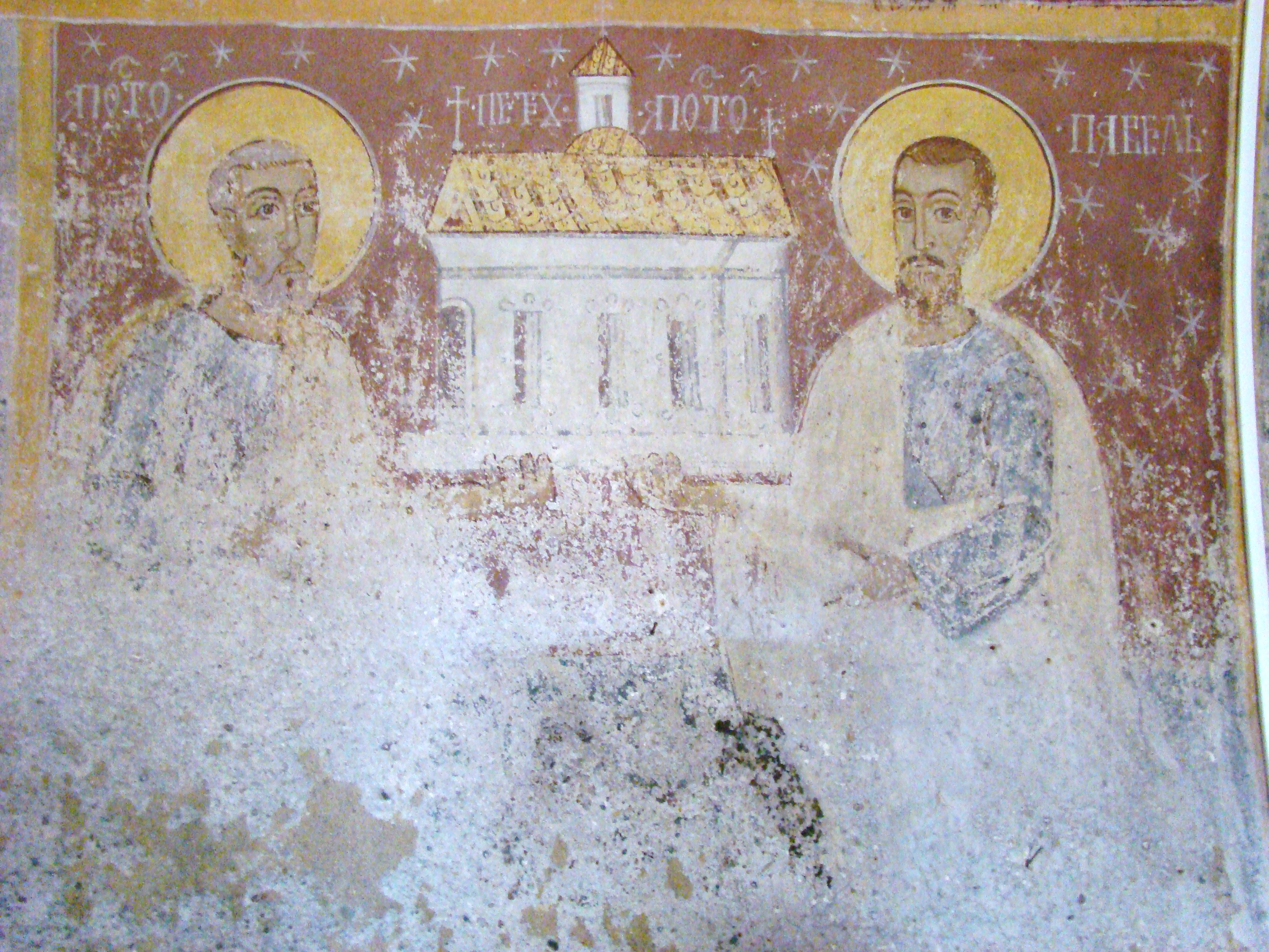 Biserica "Înălţarea Domnului" , sat NUCŞOARA; comuna SĂLAŞU DE SUS